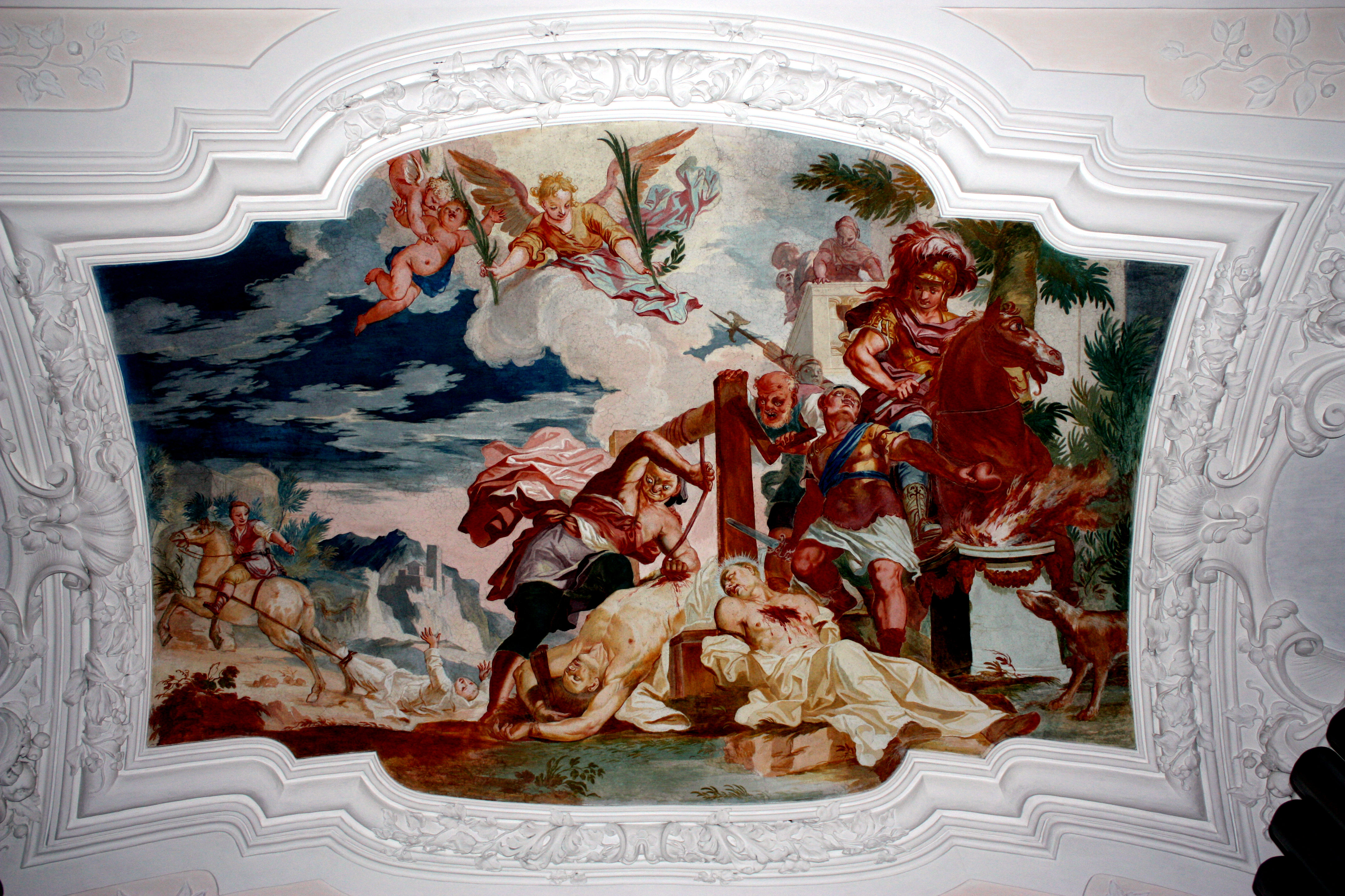 Fresko in der ehemaligen Klosterkirche der Kartause in Buxheim bei Memmingen - OpenStreetMap (Info)